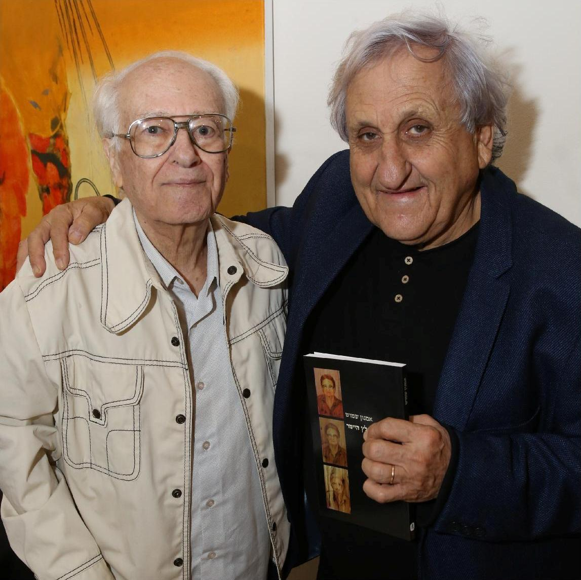 א.ב. יהושע ואמנון שמוש בערב ההשקה שנערך במרכז אלצהיימר